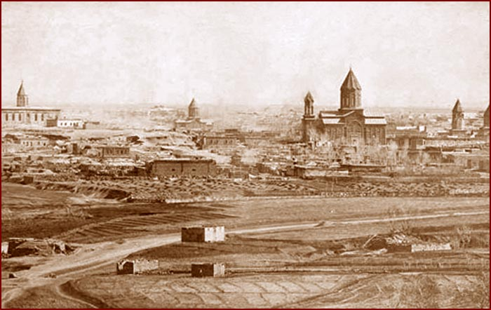 Գյումրի (Ալեքսանդրապոլ) քաղաքը 19-րդ դարում